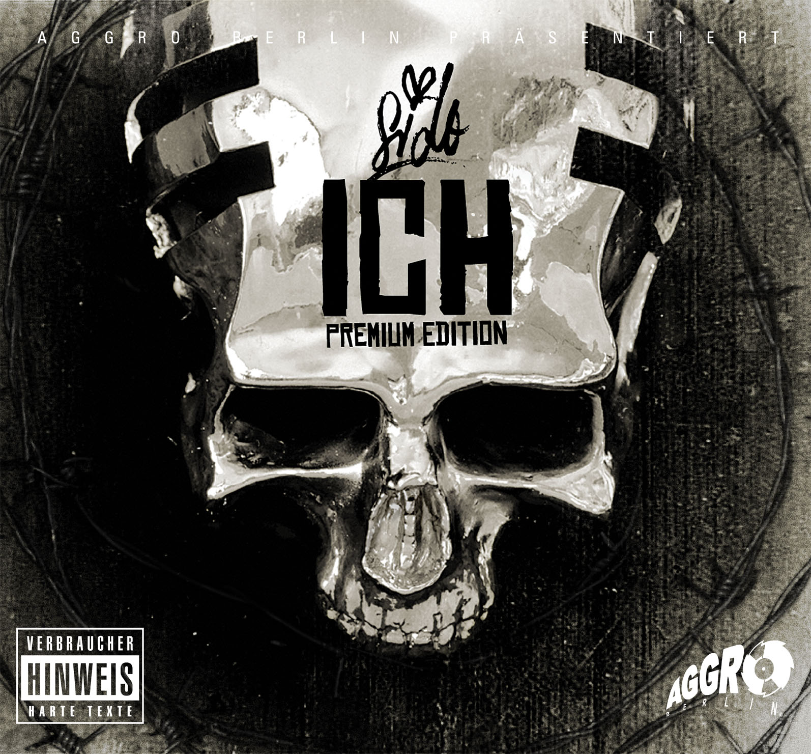 Cover des Albums „Ich“ (Pappschuber der Premium Edition)